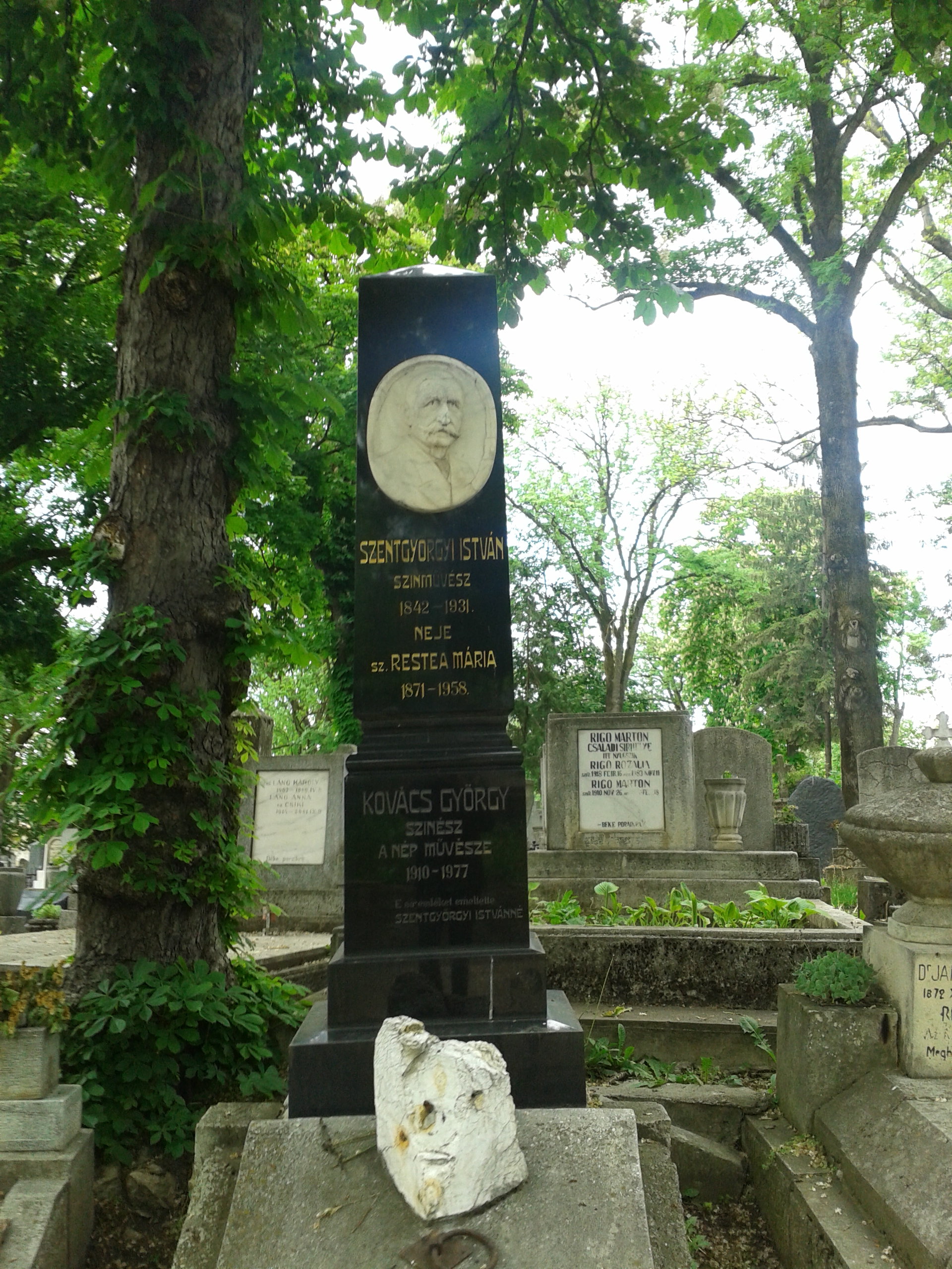 Cimitirul Central "Hajongard" Cluj Napoca Mormântul şi basorelieful lui Szentgyorgy István.